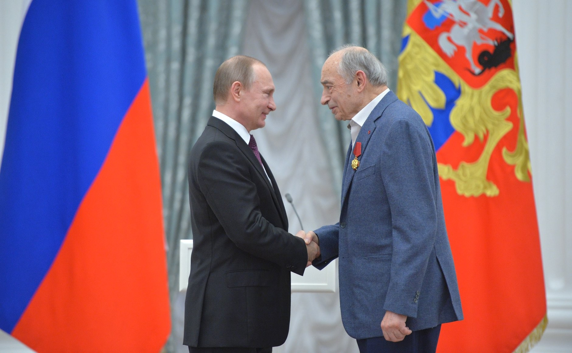 Церемония вручения государственных наград Российской Федерации. Орденом «За заслуги перед Отечеством» IV степени награждён актёр театра «Современник» Валентин Гафт